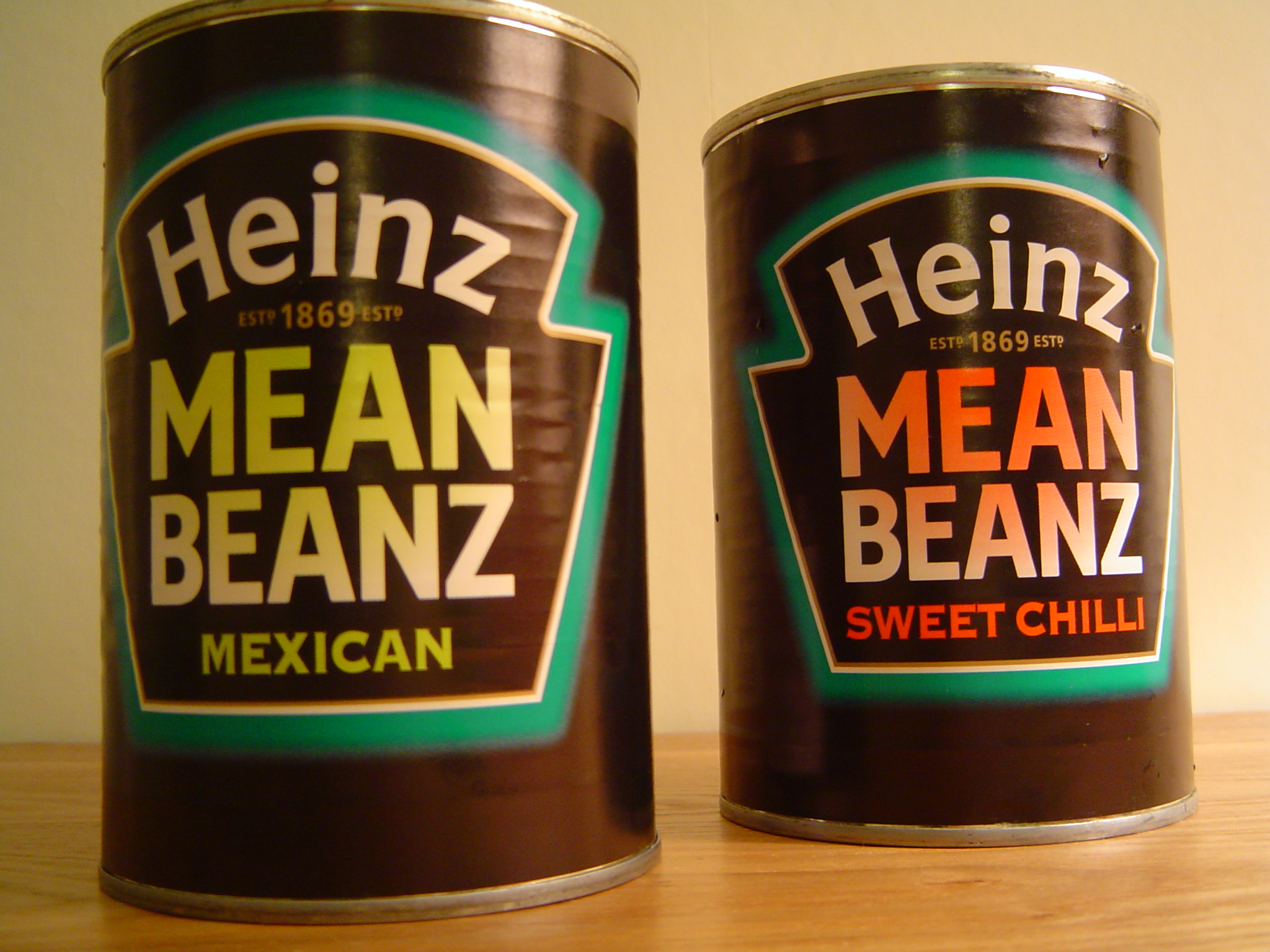 Heinz Spicy Beanz